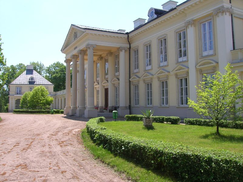 Walewice.